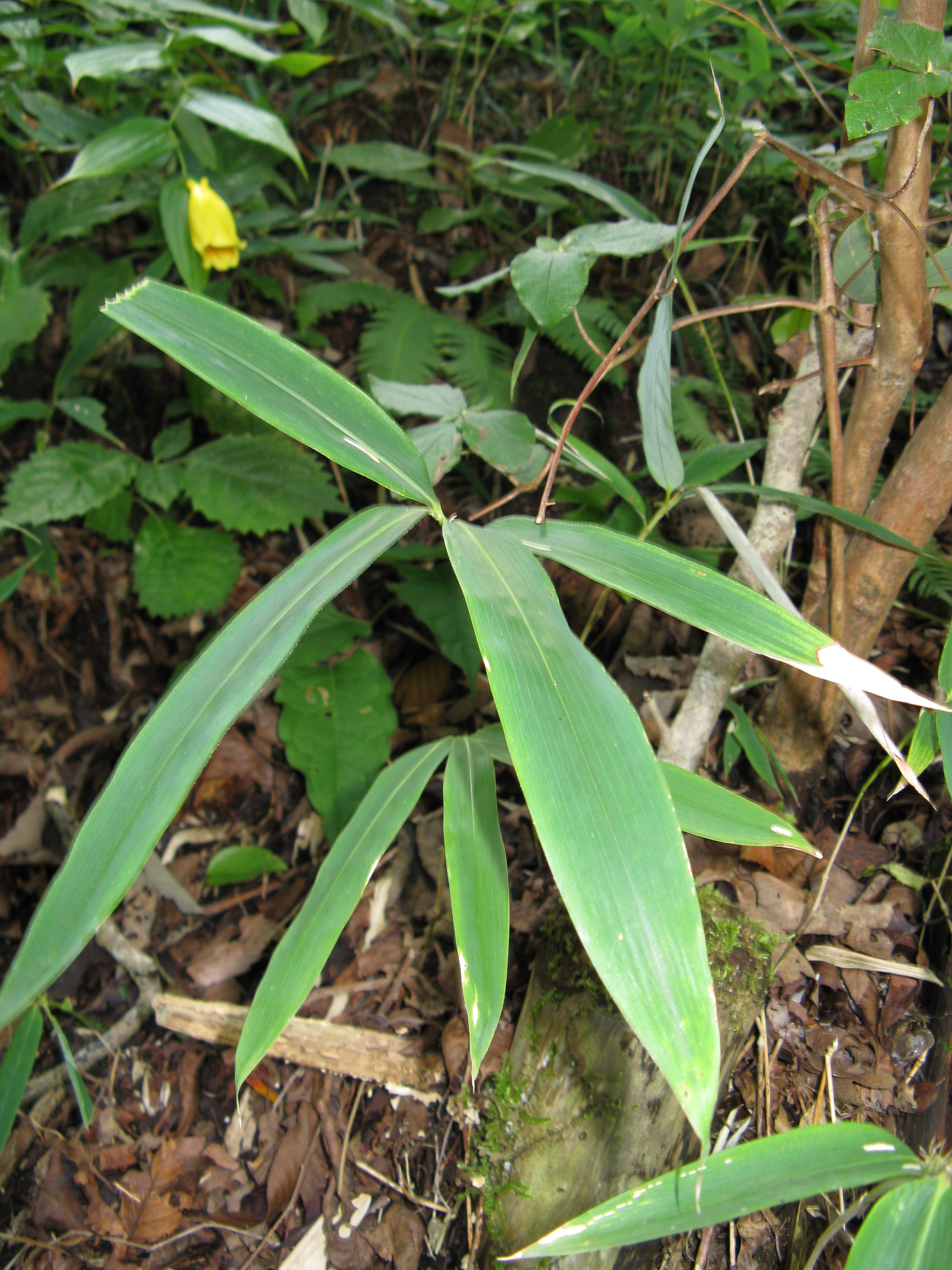 Scientific name Sasa nipponica